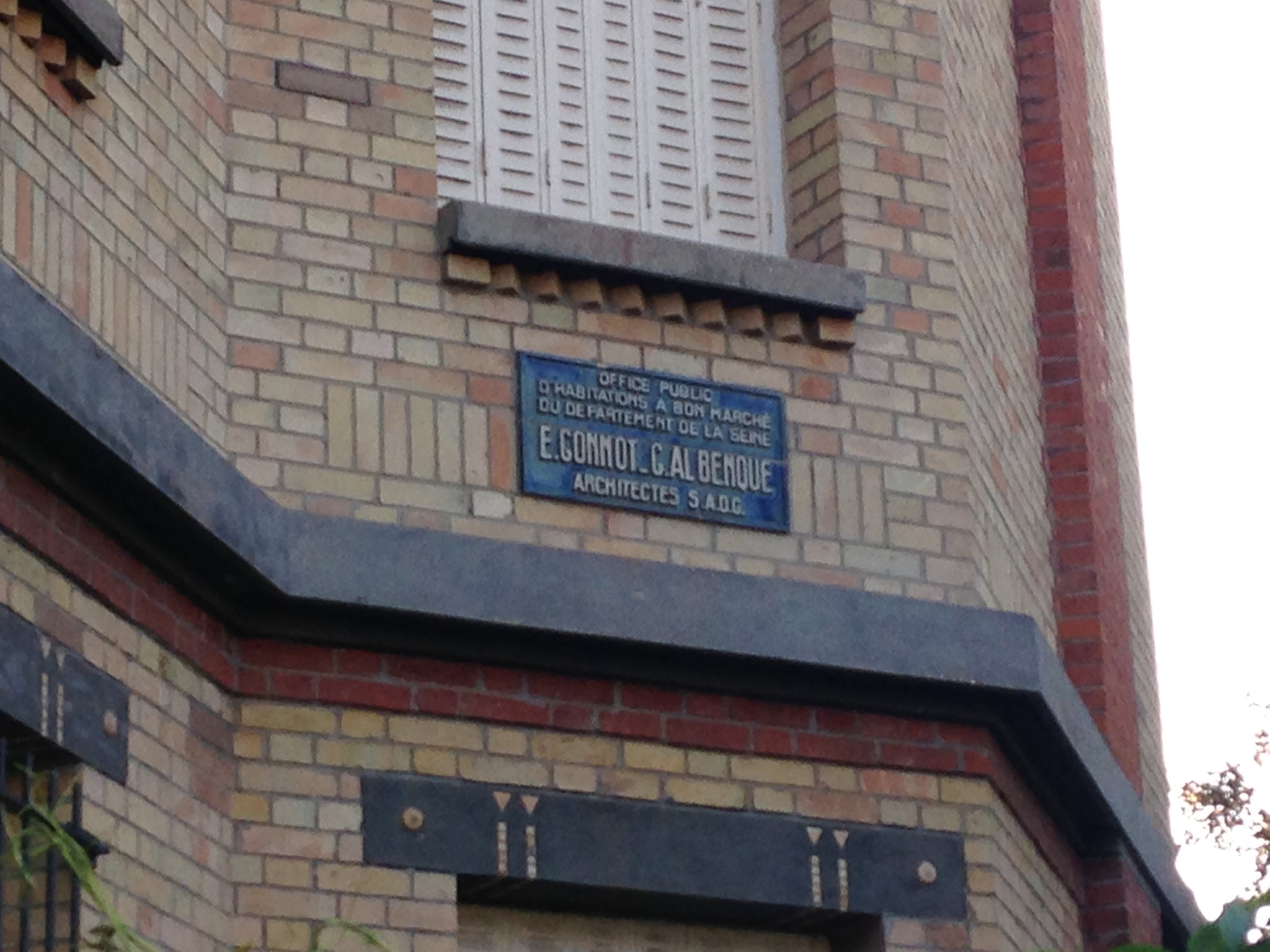 Plaque des architectes Gonnot et Albenque à la cité-jardin de Stains (Seine-Saint-Denis)